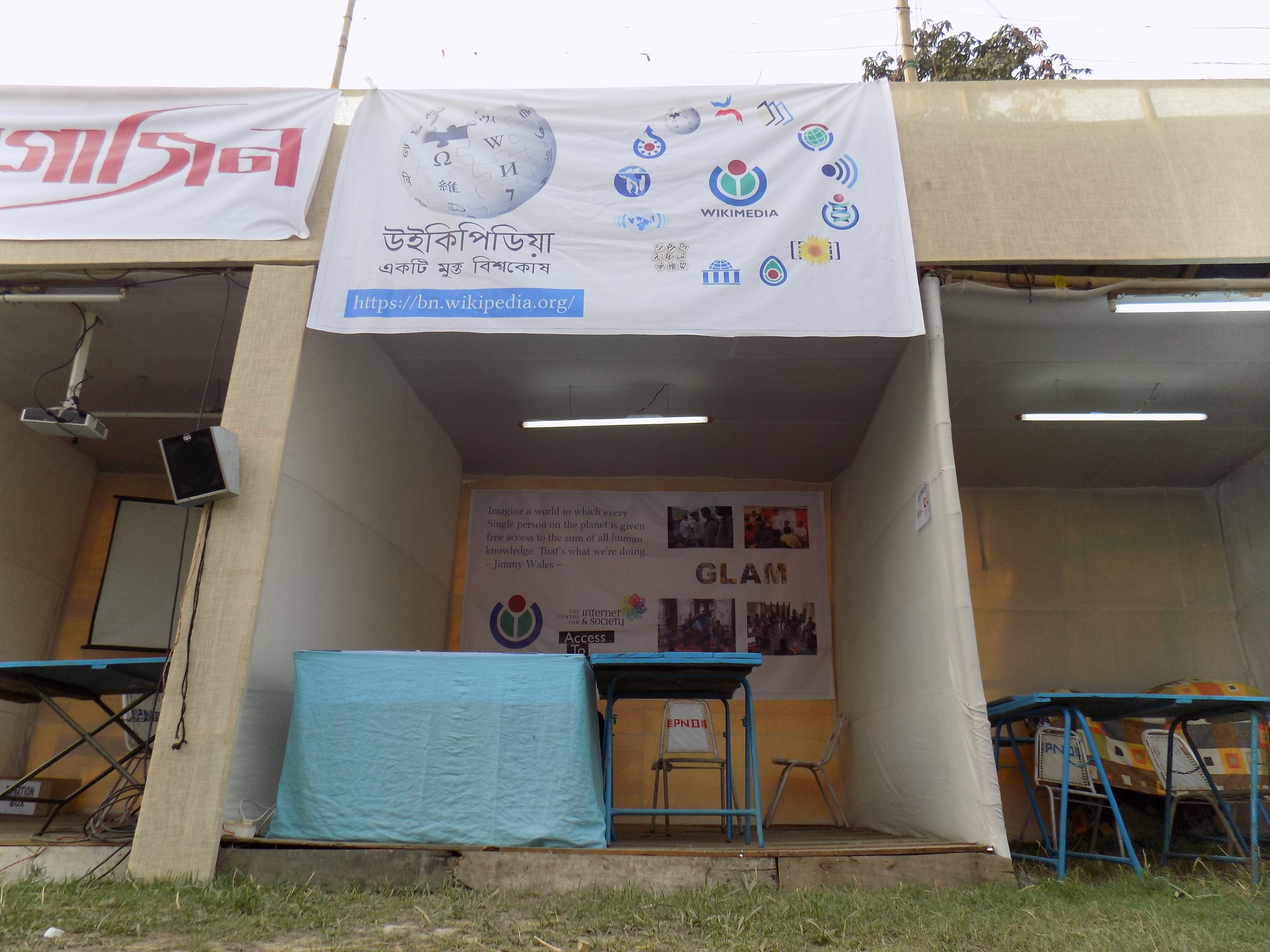 Photographed in Kolkata, India